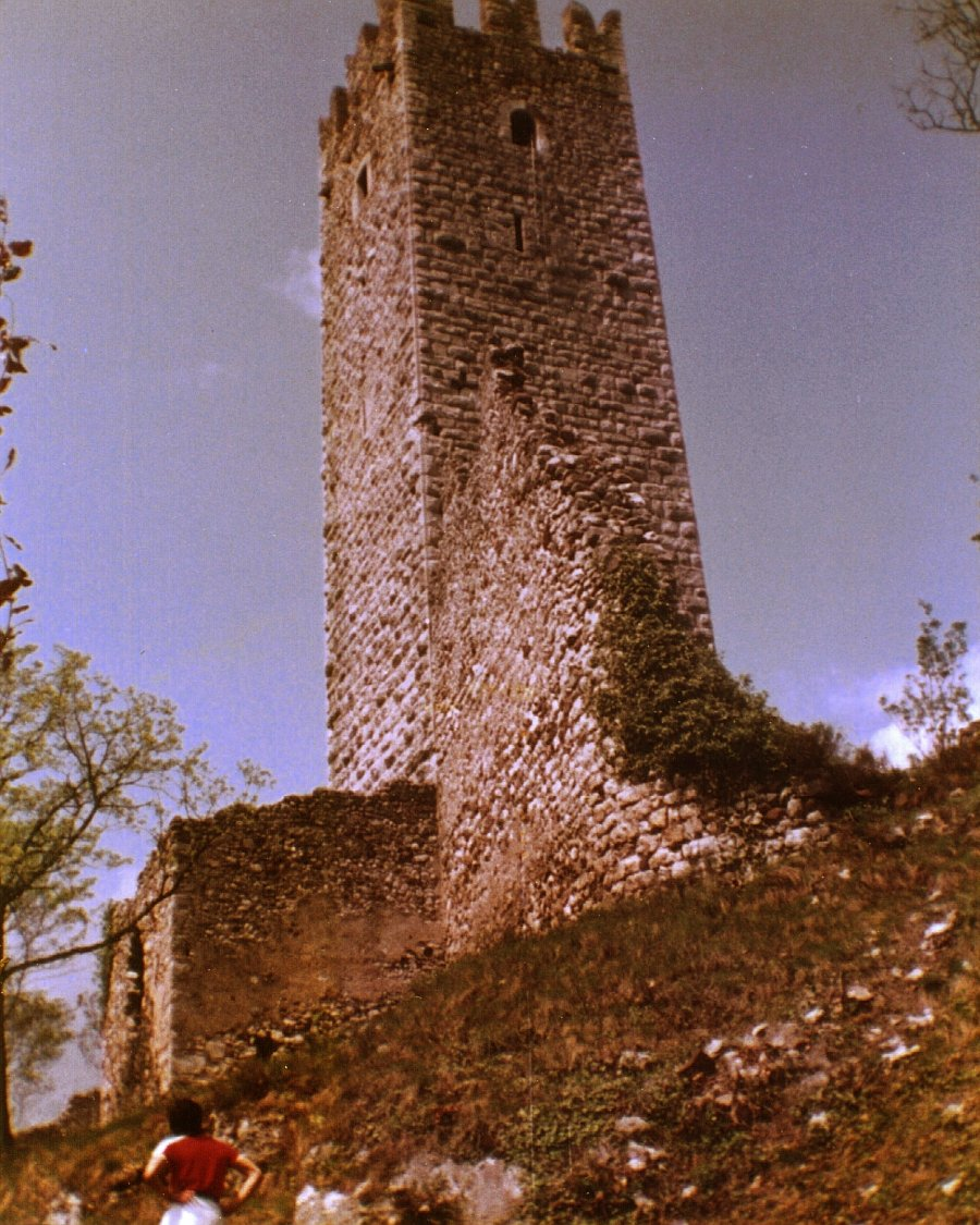 Burg Drena